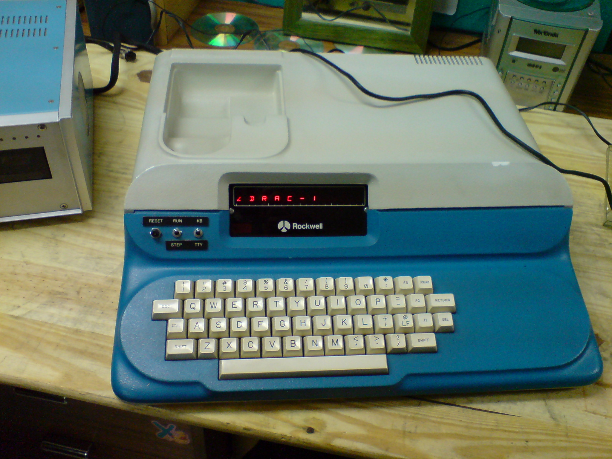 Prototipo de Comelta Drac-1, basado en Rockwell AIM-65 encendido